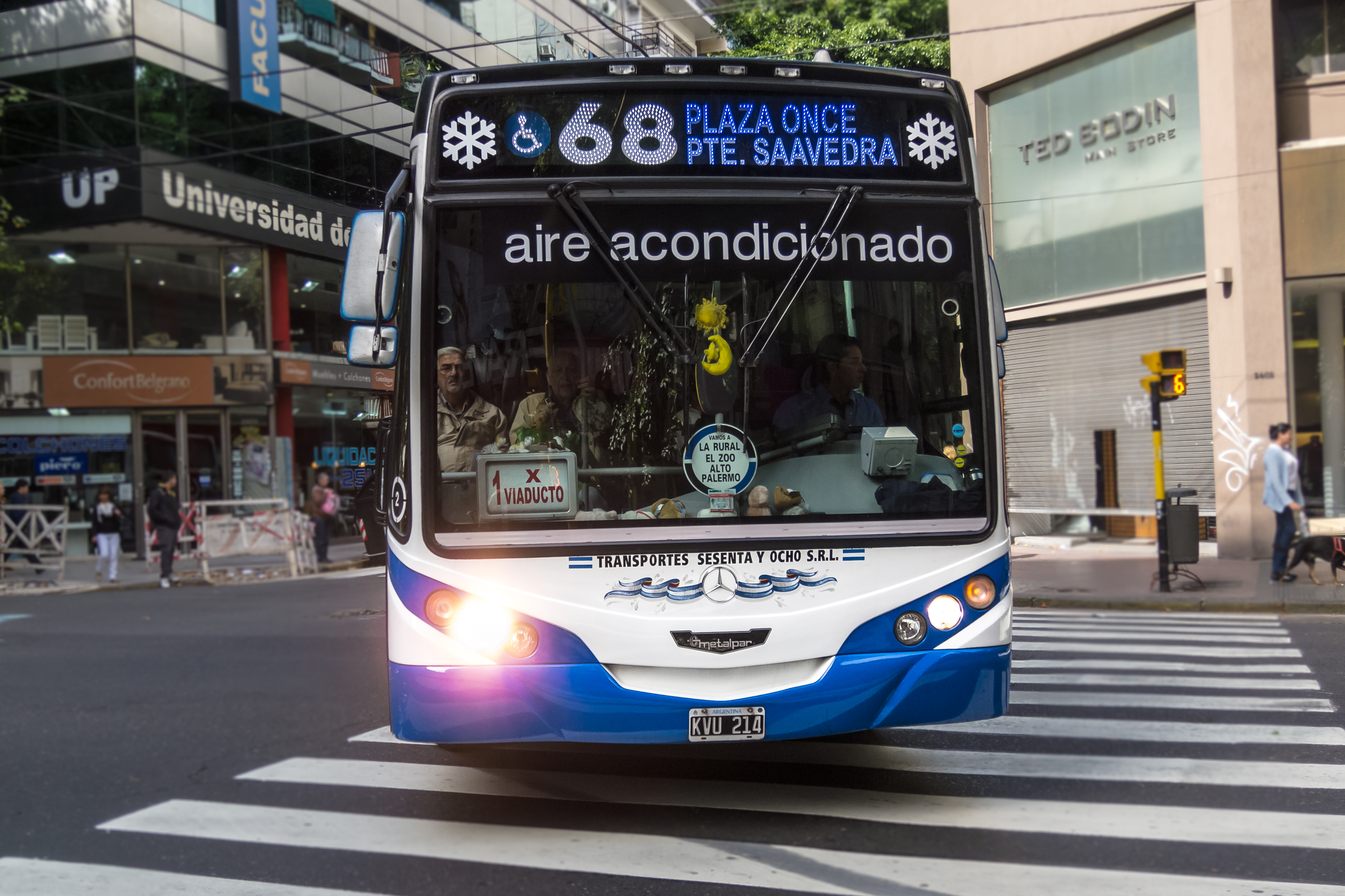 Colectivo de la Línea 68, interno 2, carrocería Metalpar Iguazú 2, chasis Mercedez-Benz OH 1618L-SB, matrícula KVU214. Buenos Aires, Argentina.